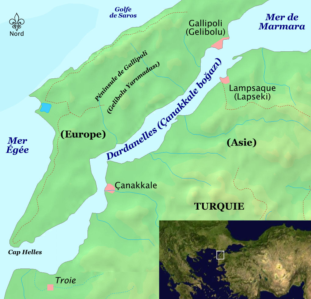 Titre : carte du détroit des Dardanelles (Turquie) Source : fond de carte vierge provenant de Date : 1 juin 2006 Licence : domaine public